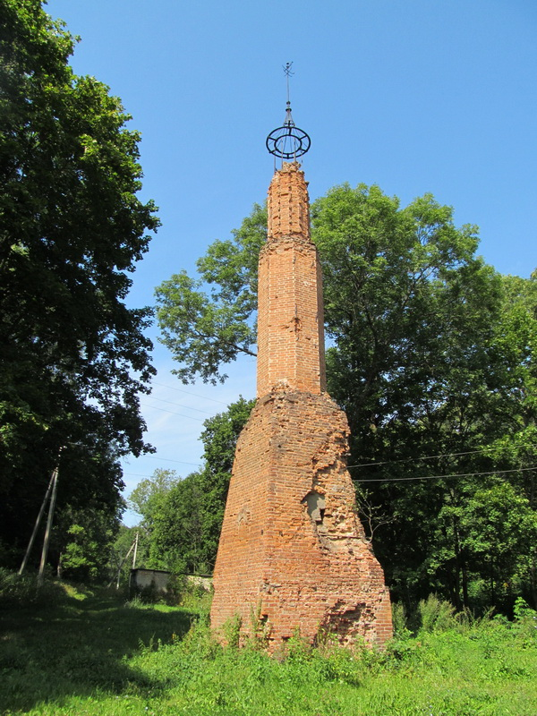 Слаўгарад. Сядзіба Галіцыных. Вежа